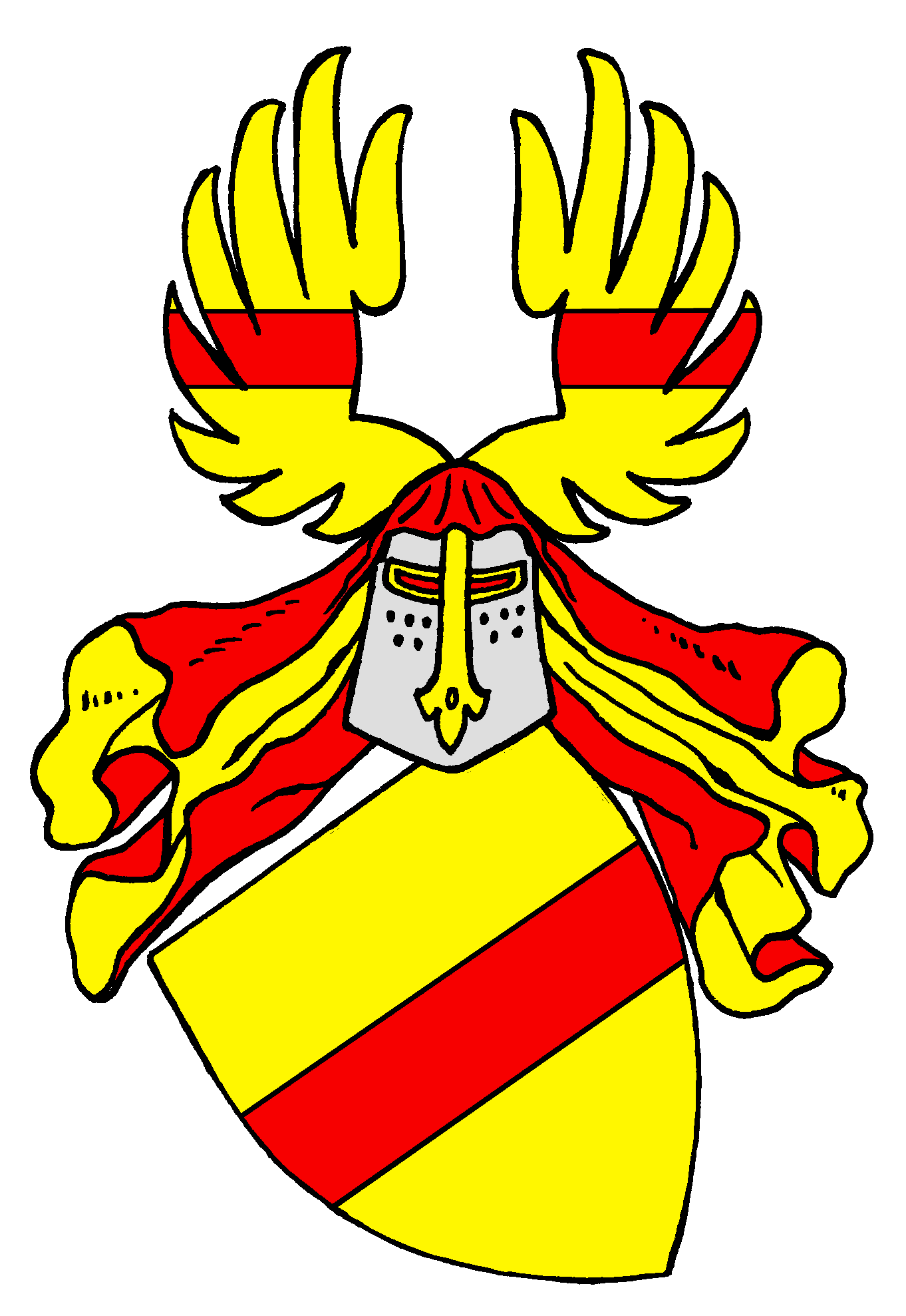 Stammwappen der von Schöneck, aus dem Hunsrück: Johann von Schöneck 1370, angeblich Abkömmlinge der von Boppard. In Gold ein roter Balken. Helmzier: Ein wie der Schild bezeichneter offener Flug. Helmdecke: rot-golden.